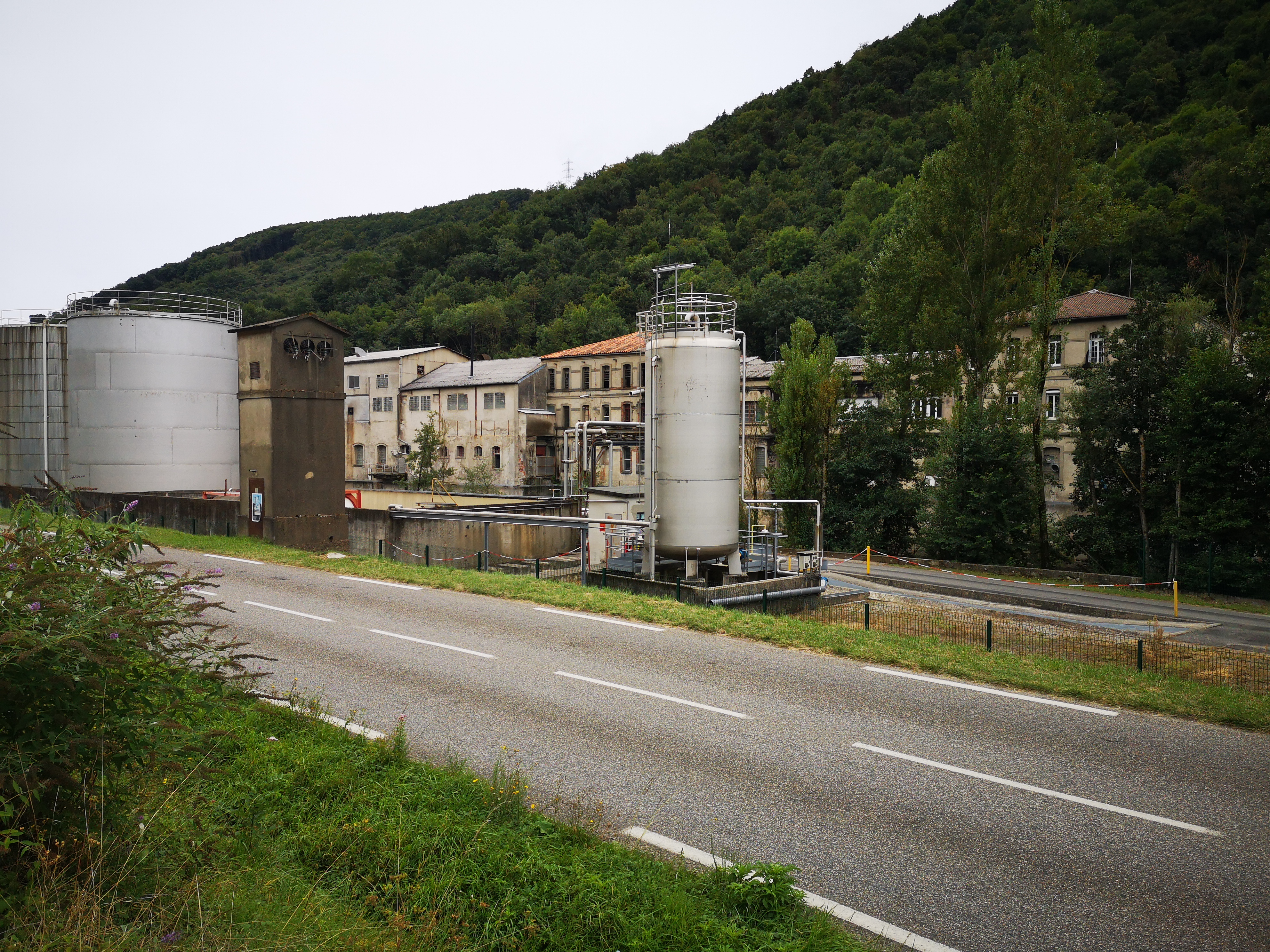 La papeterie de la Moulasse vue depuis Encourtiech (Ariège).